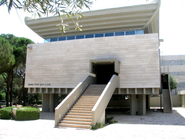 בית הכנסת בטכניון